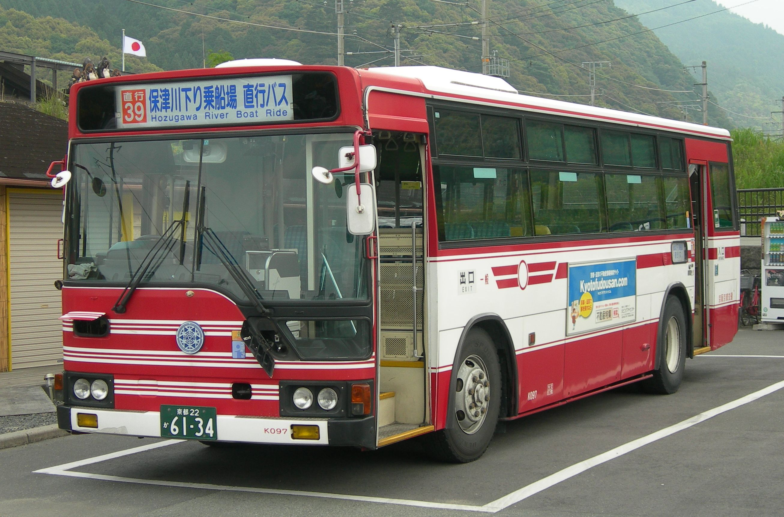 京阪京都交通 路線バス